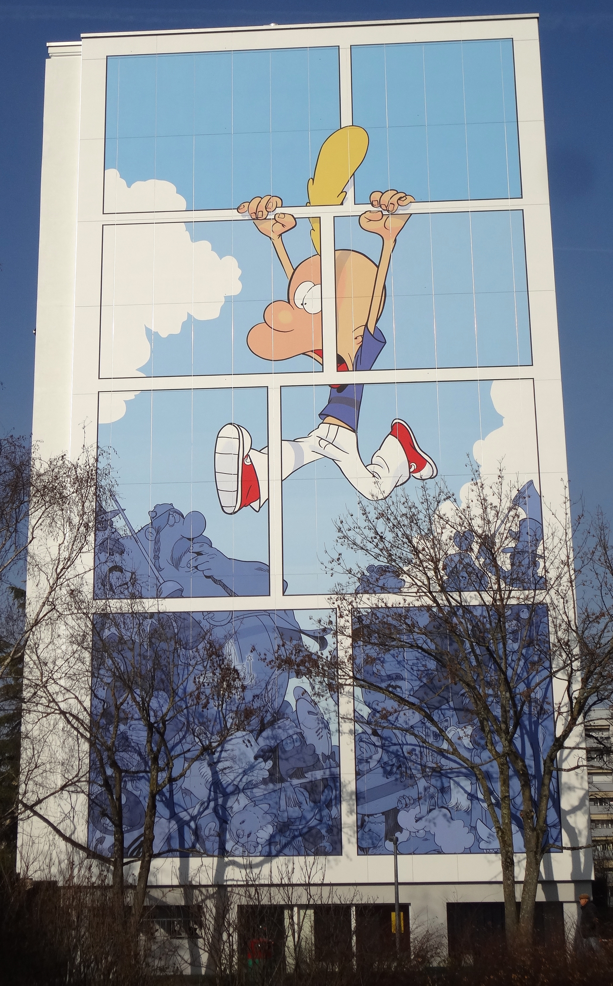 Le personnage de Titeuf est peint sur la façade rénovée d'un immeuble à la rue de la Calle, Onex, canton de Genève. Visible depuis l'avenue du Bois-de-la-Chapelle.